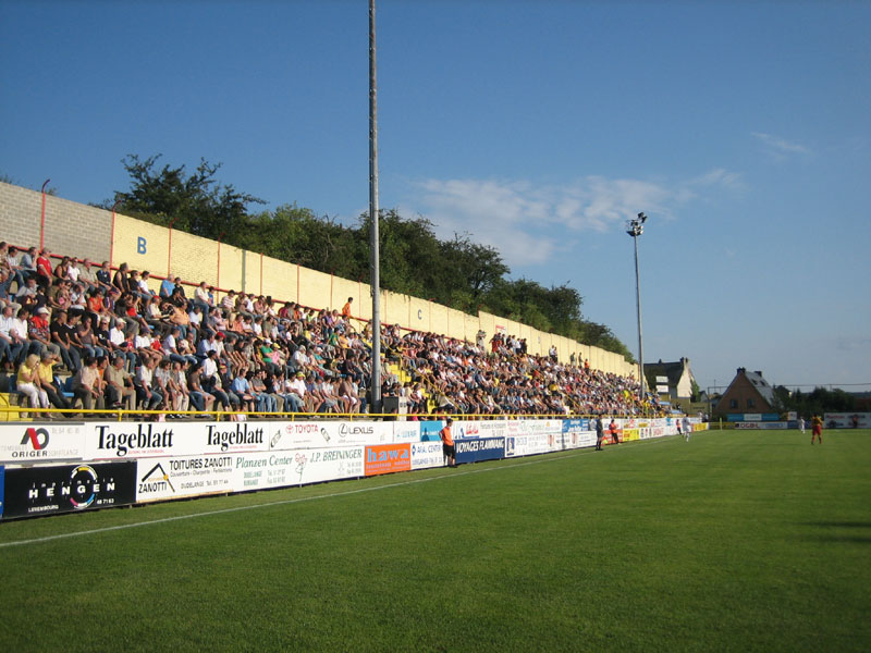 Fast voll besetzte Gegentribüne im Stade Jos Nosbaum. Aufgenommen beim Spiel F91 Dudelange gegen MŠK Žilina (Champions League Qualifikation 1. Runde Saison 2007/08).